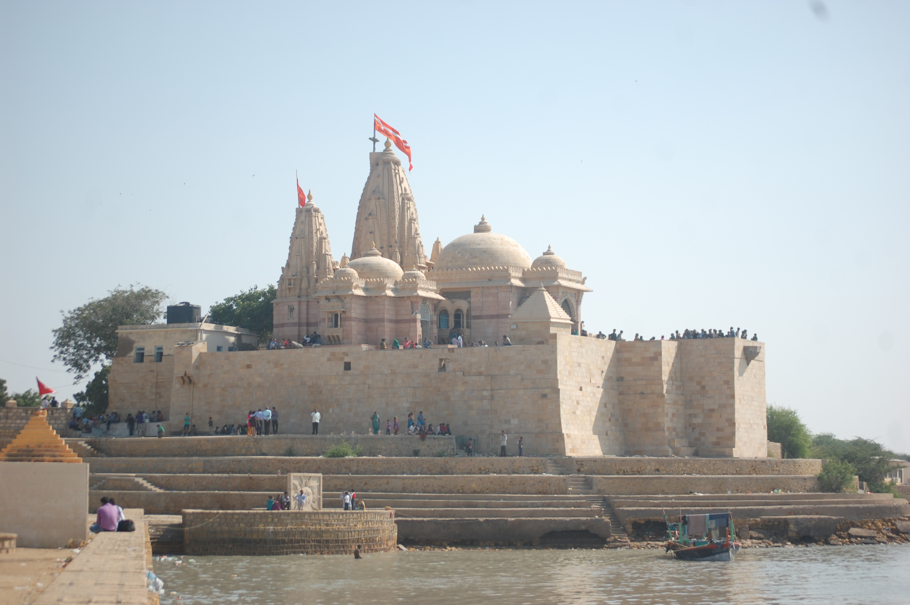 ગુજરાતી: કોટેશ્વર મંદિર